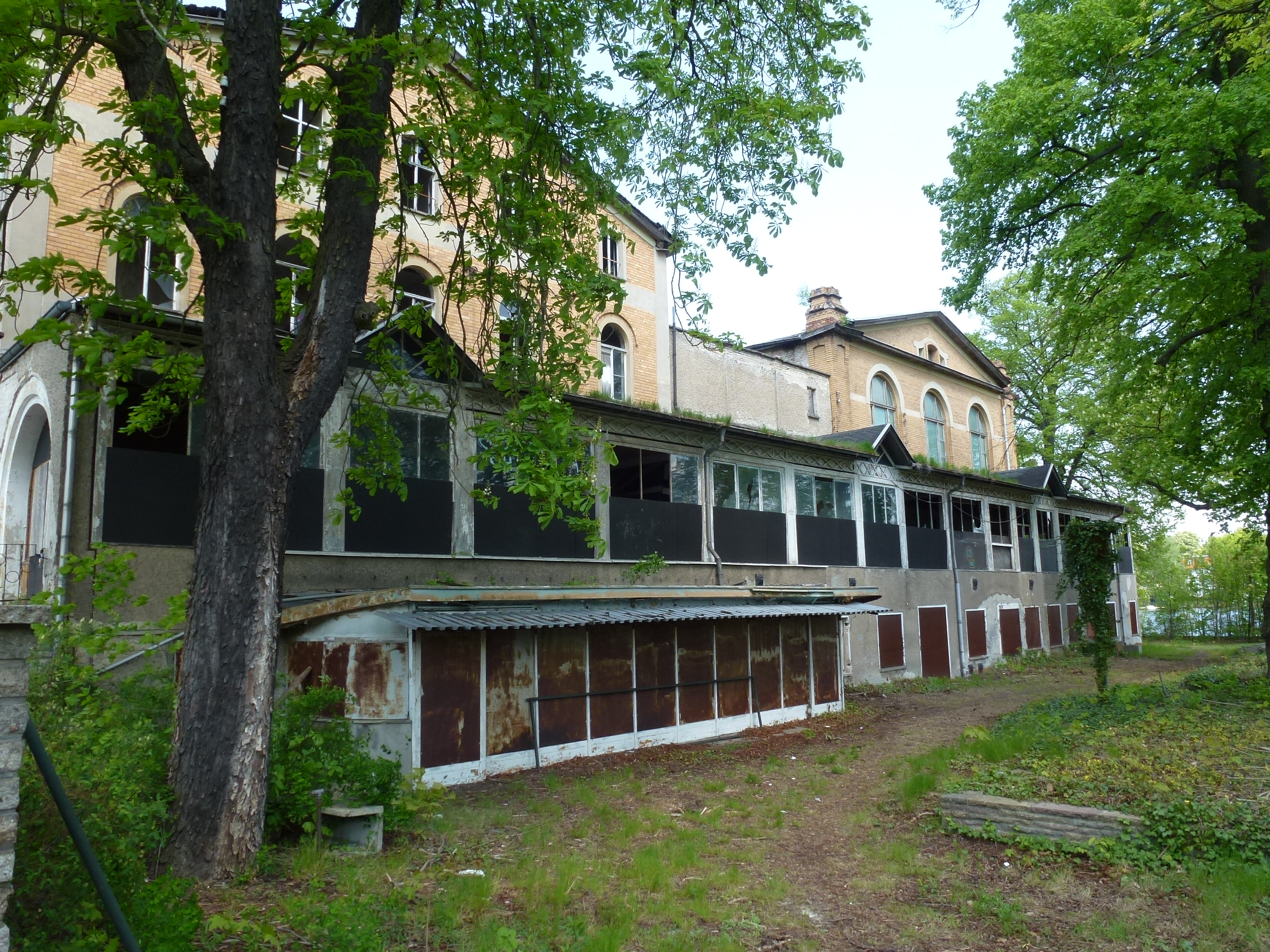 Berlin-Grünau Regattastraße Gesellschaftshaus